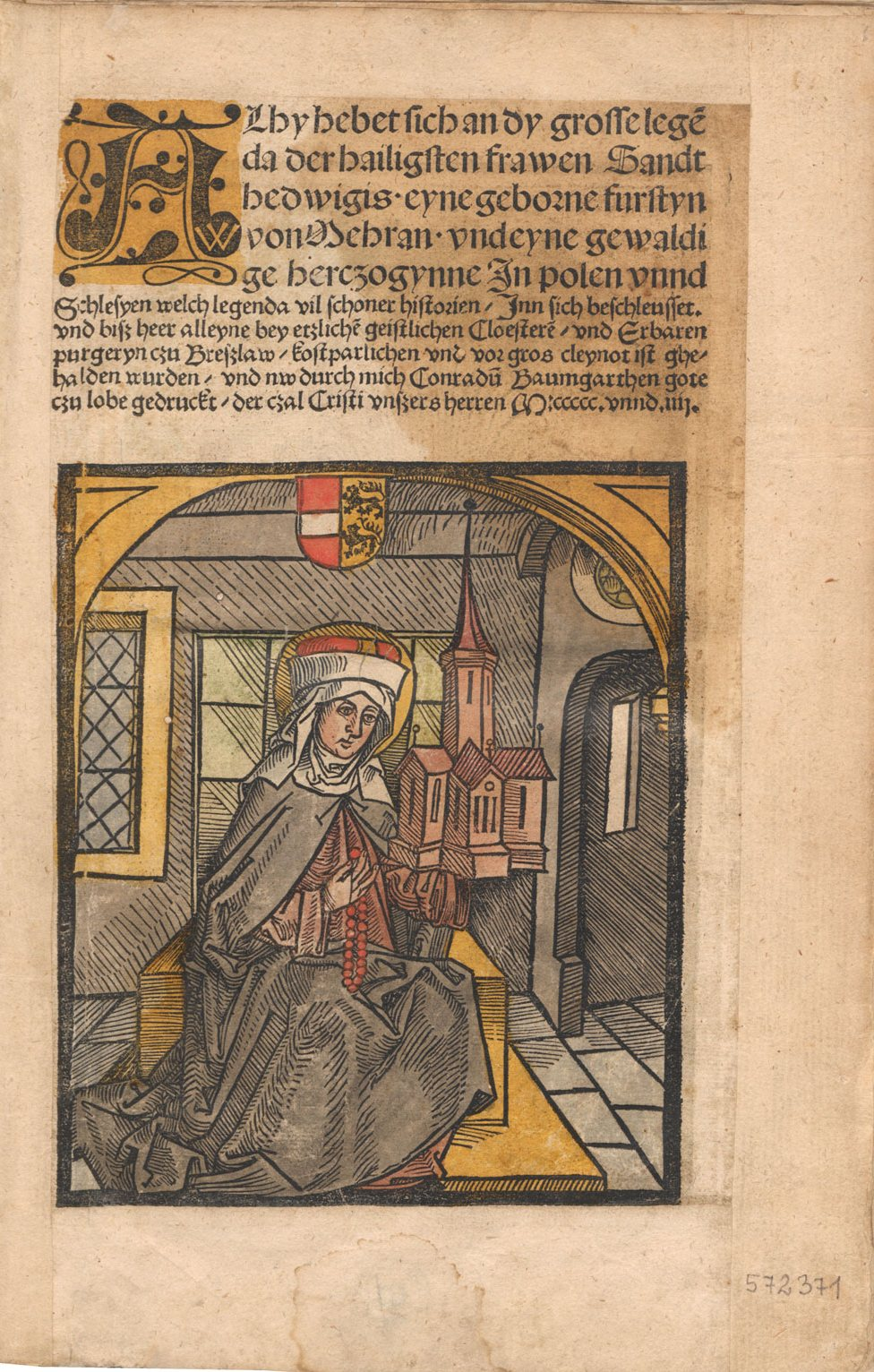 Legenda o św. Jadwidze", Wrocław 1504, Konrad Baumgarten